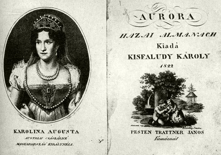 Az Aurorát Kisfaludy Károly indította meg 1821-ben. Kiadását Trattnernál, a Tudományos Gyűjtemény kiadójánál határozták el, de a tőkét többen adták össze, elsősorban Kisfaludy Sándor és Kultsár István, a lapszerkesztő.